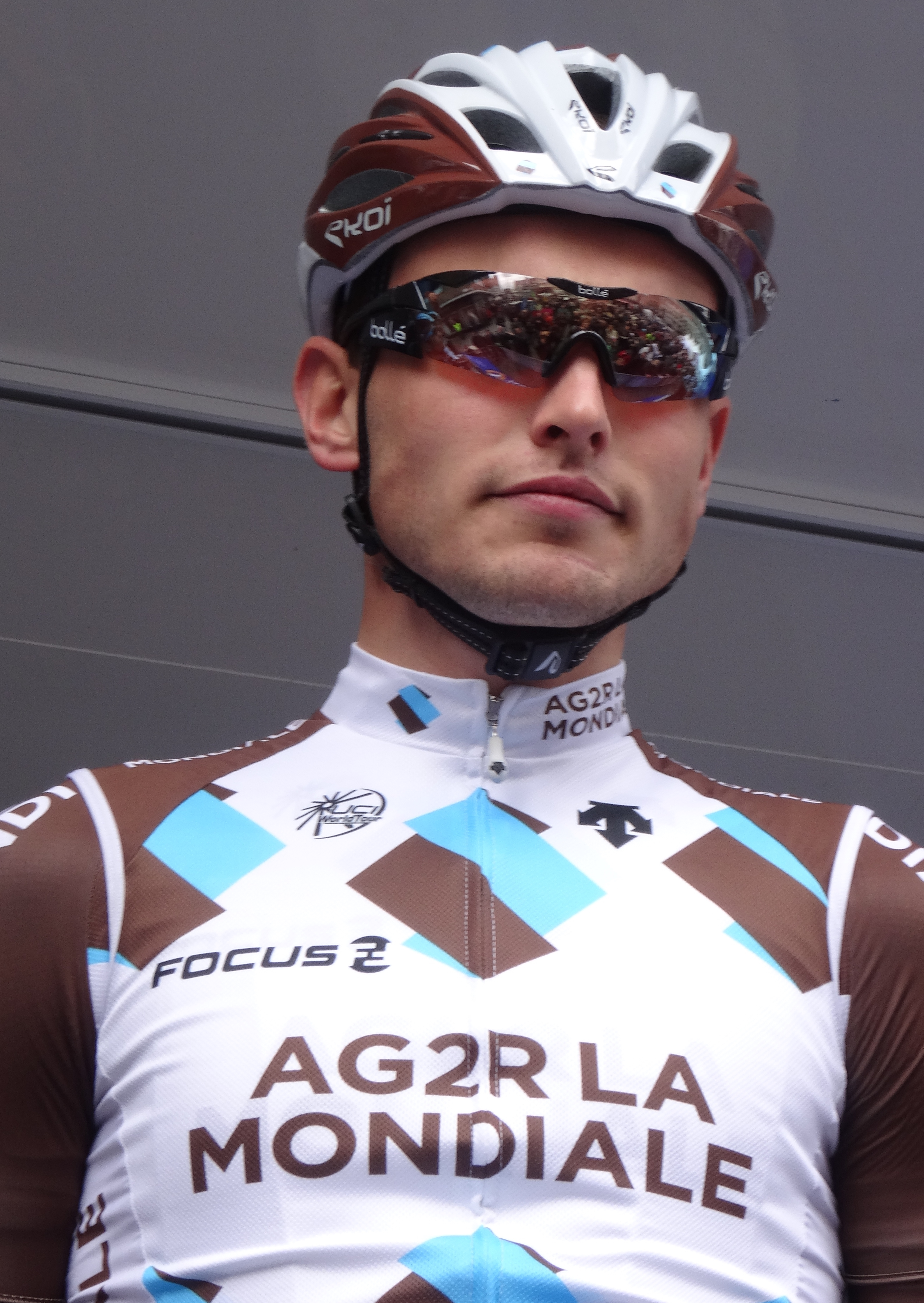 Reportage photographique réalisé le mercredi 7 mai 2014 au départ de la première étape de l'édition 2014 des Quatre jours de Dunkerque à Dunkerque, Nord, Nord-Pas-de-Calais, France. Depicted person: Maxime Daniel Depicted team: AG2R La Mondiale